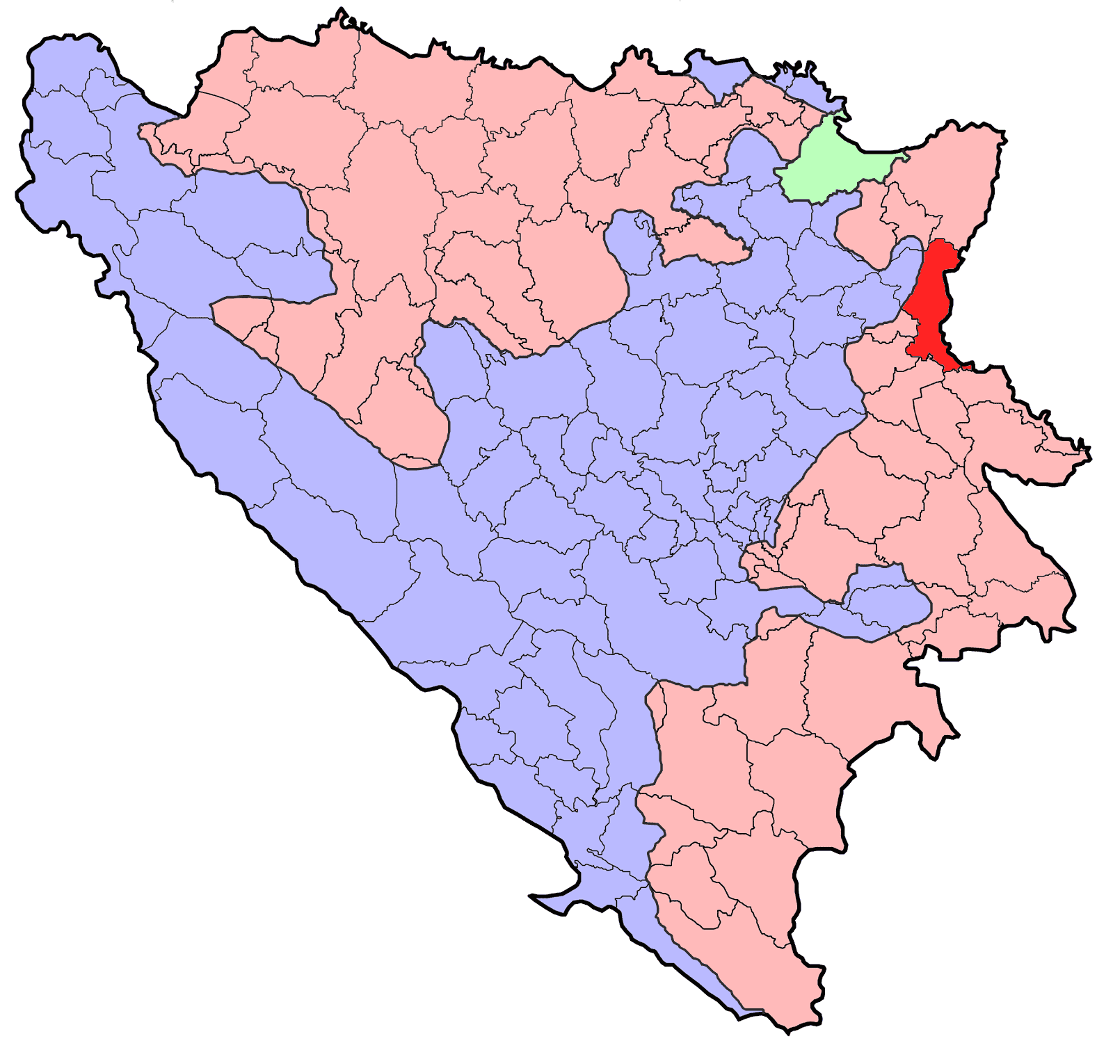 Republika Srpska (BiH) municipality